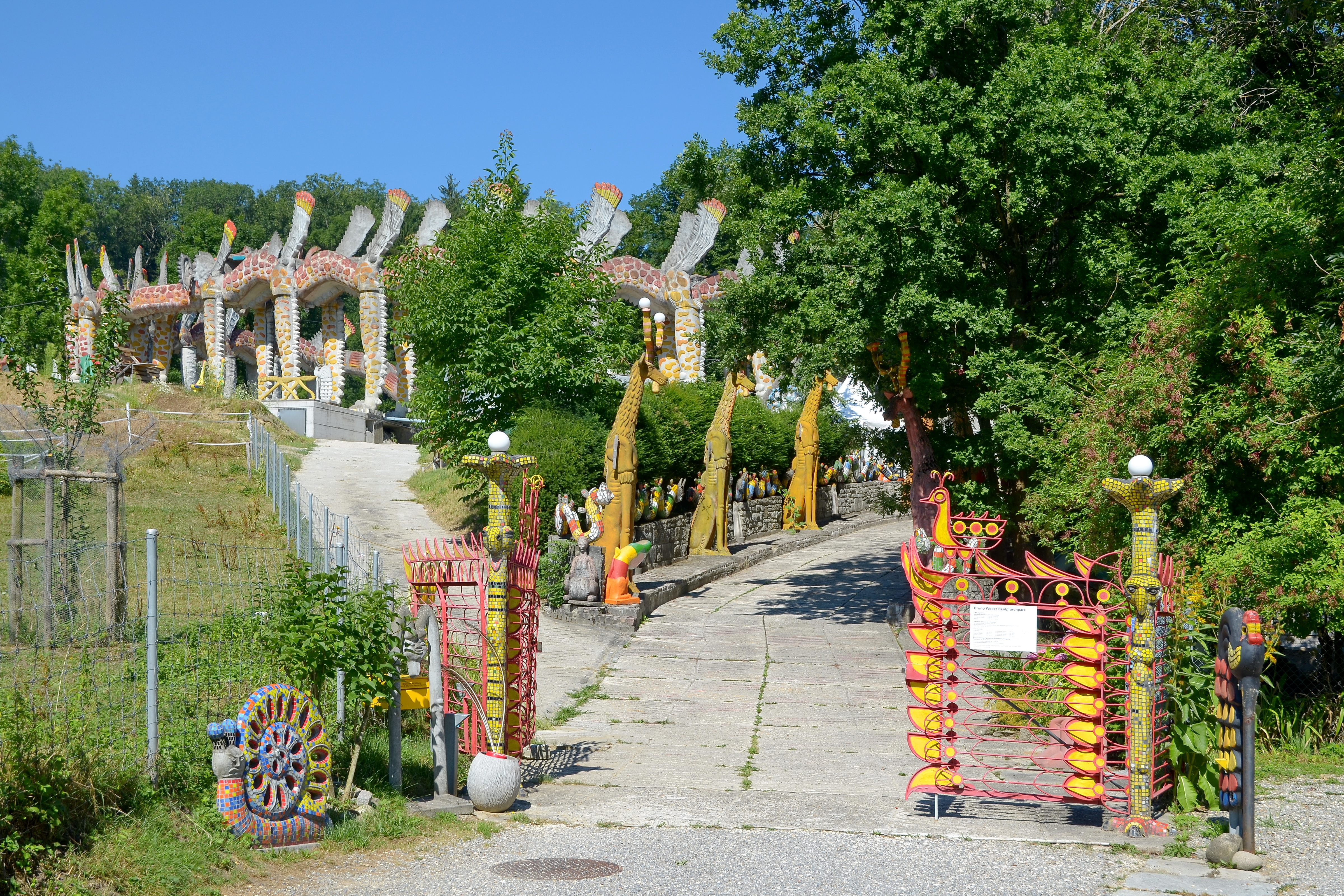 Bruno Weber Skulpturenpark in Dietikon - Spreitenbach (Switzerland)